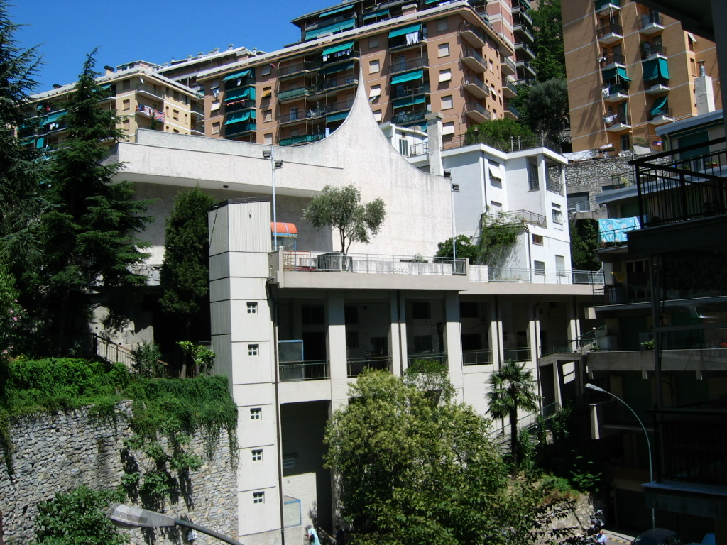 Genova Oregina - N.S. della Provvidenza